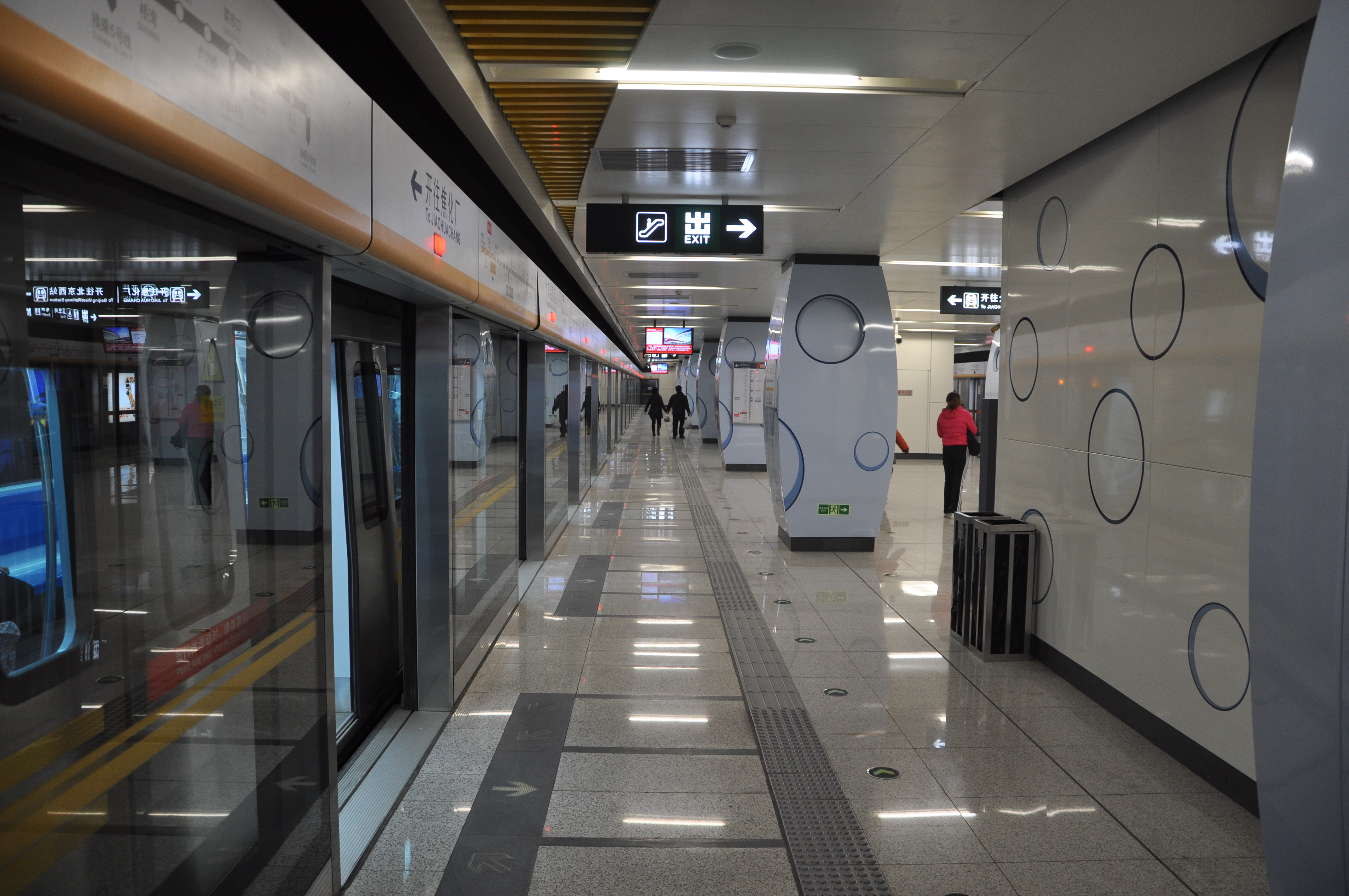 北京地铁7号线欢乐谷景区站站台。